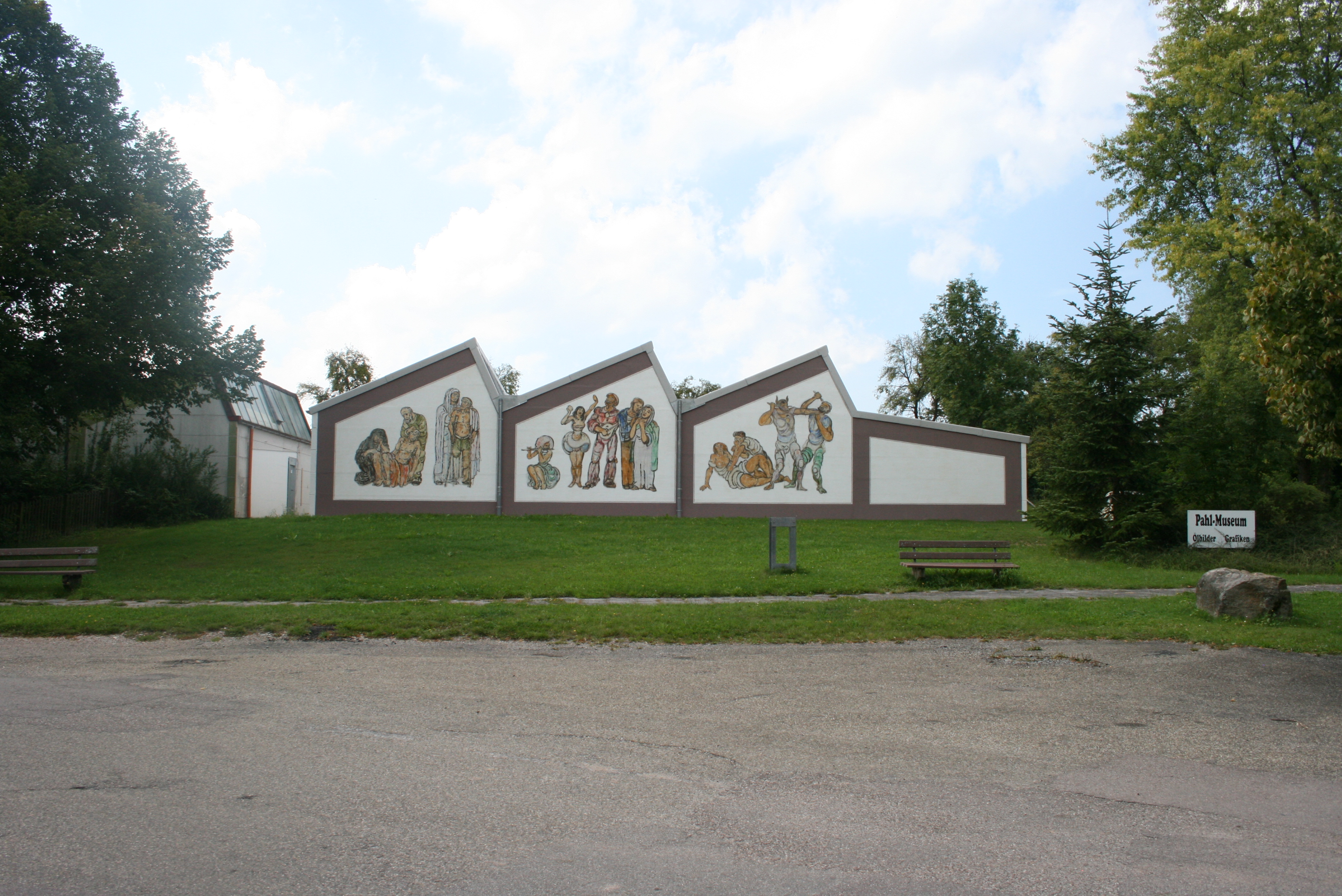 Das Pahl Museum — in Mainhardt-Gailsbach, in Baden-Württemberg (state).